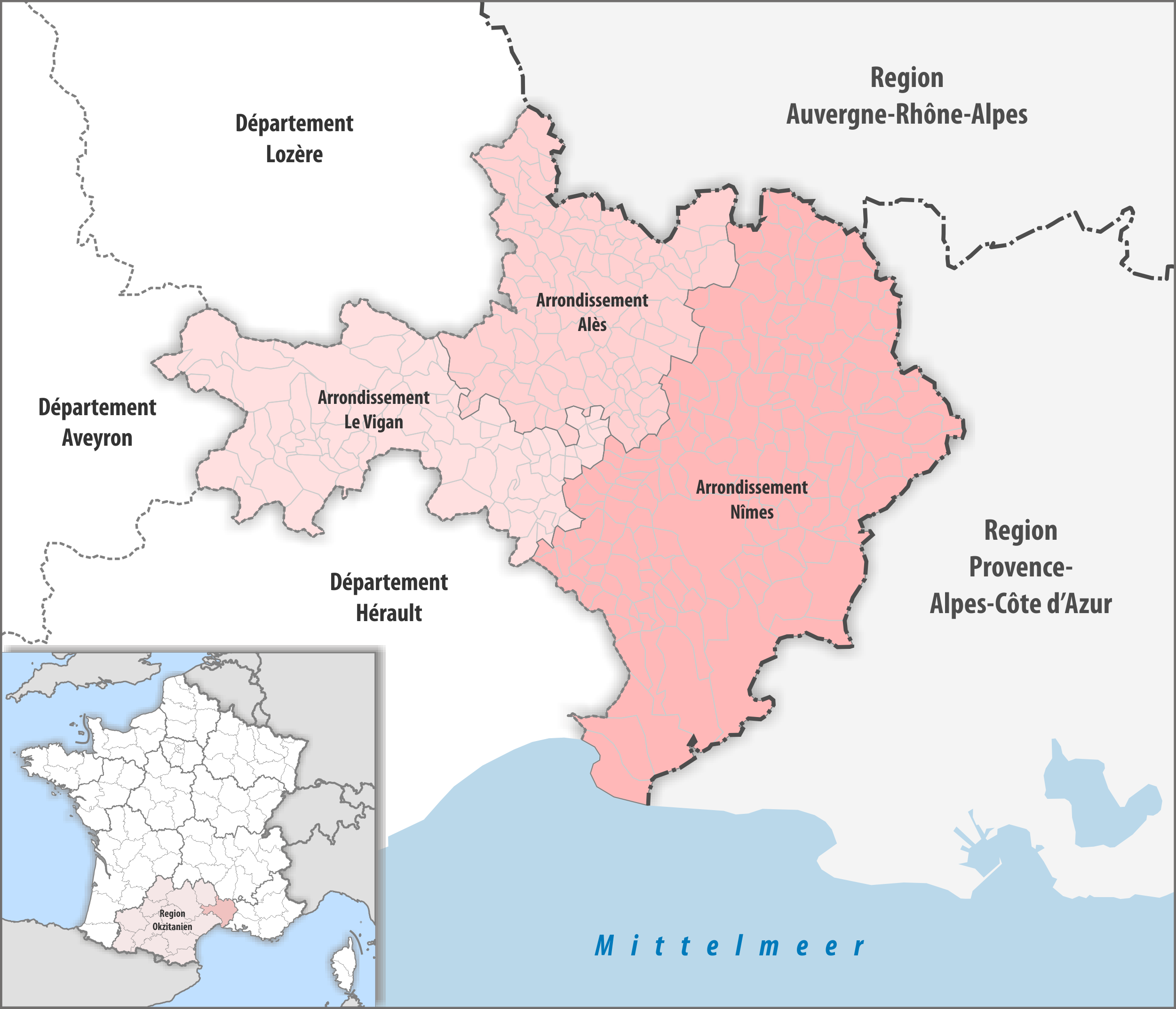 Gemeinden und Arrondissemente im Departement Gard